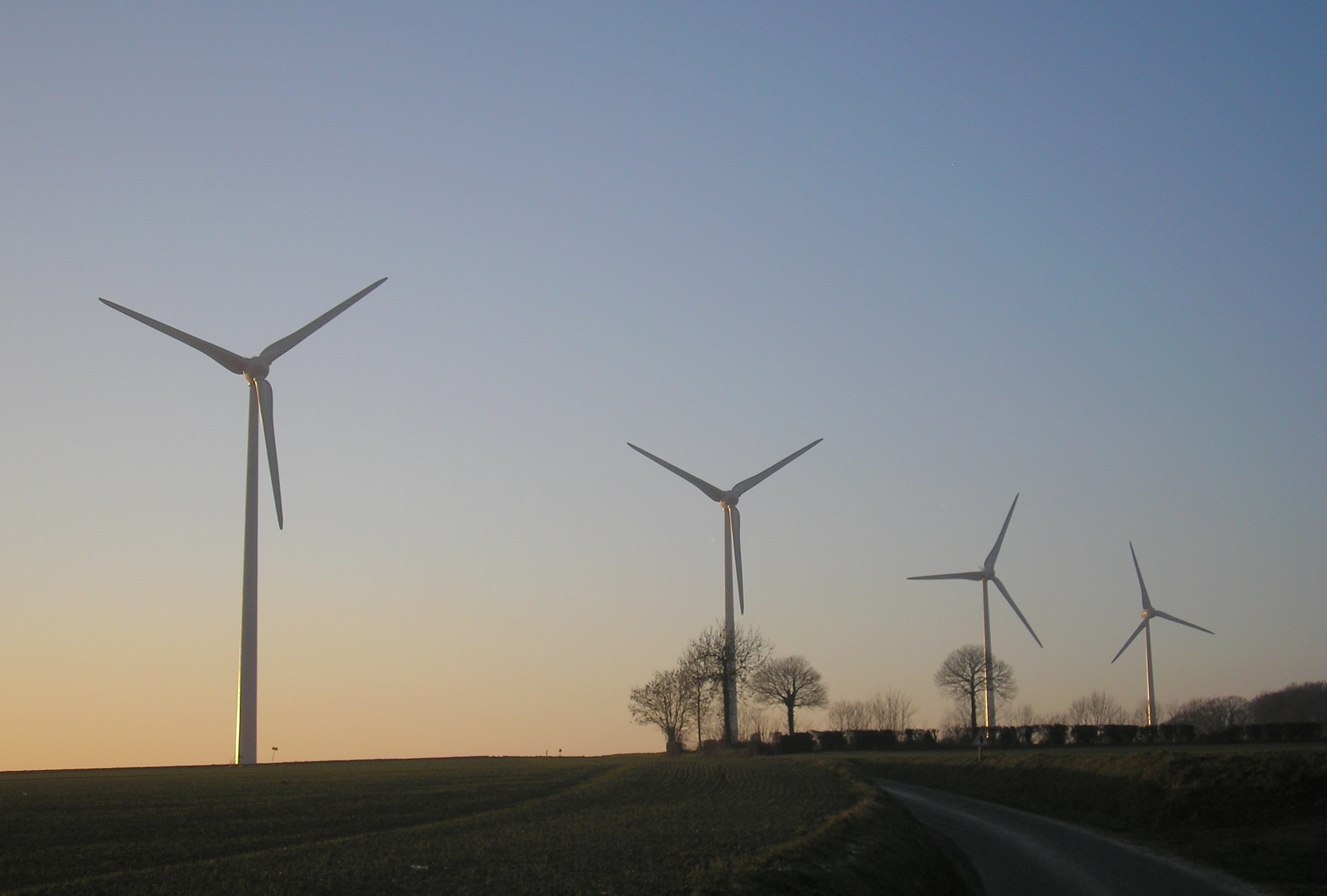 Sallen (Normandie, France). Parc éolien de Sallen (4 turbines Enercon de 2 MW).